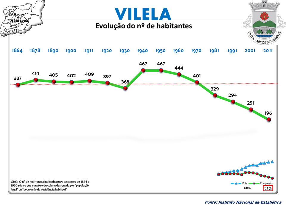 Censos 1864/2011